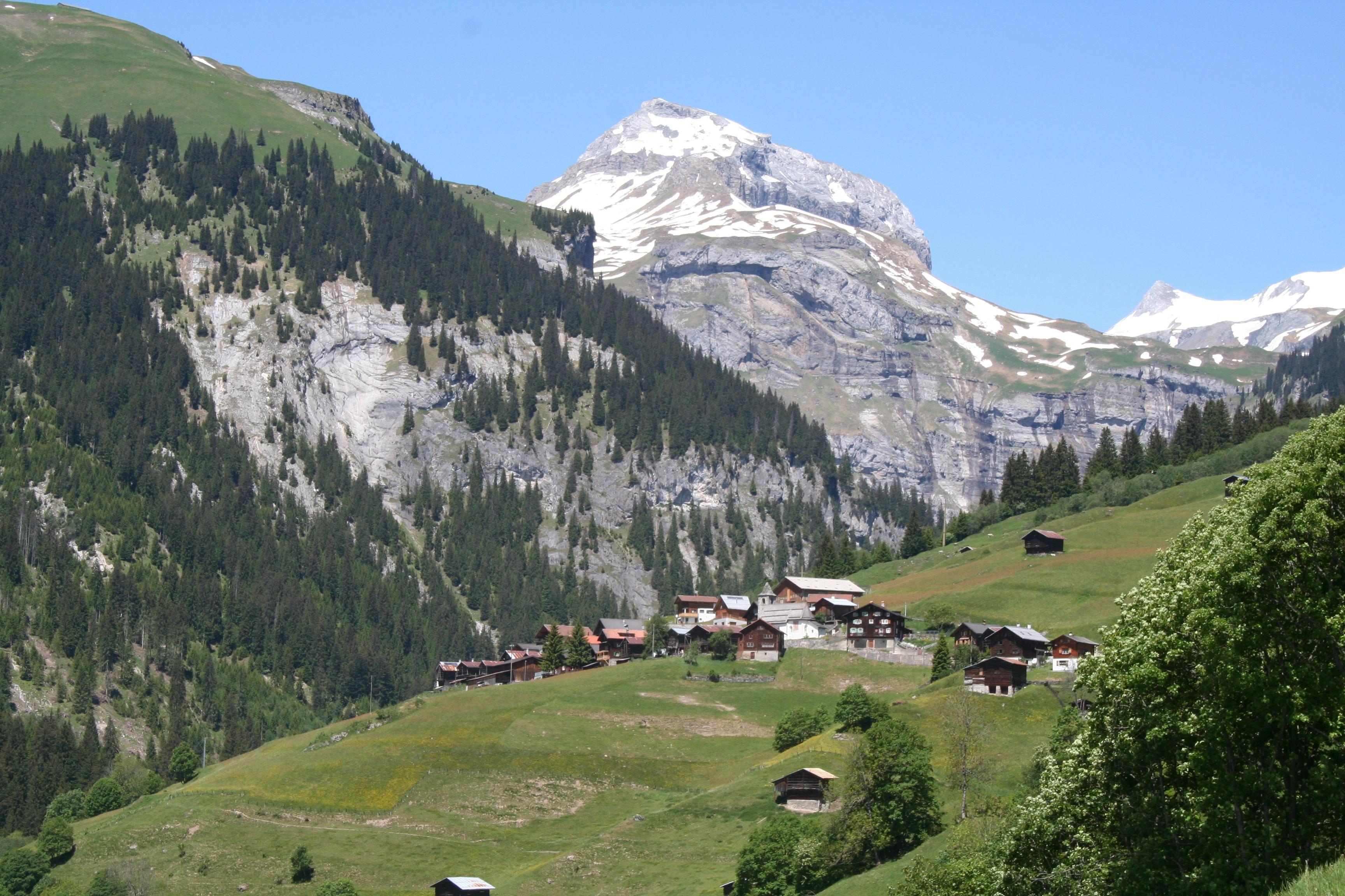 Pigniu